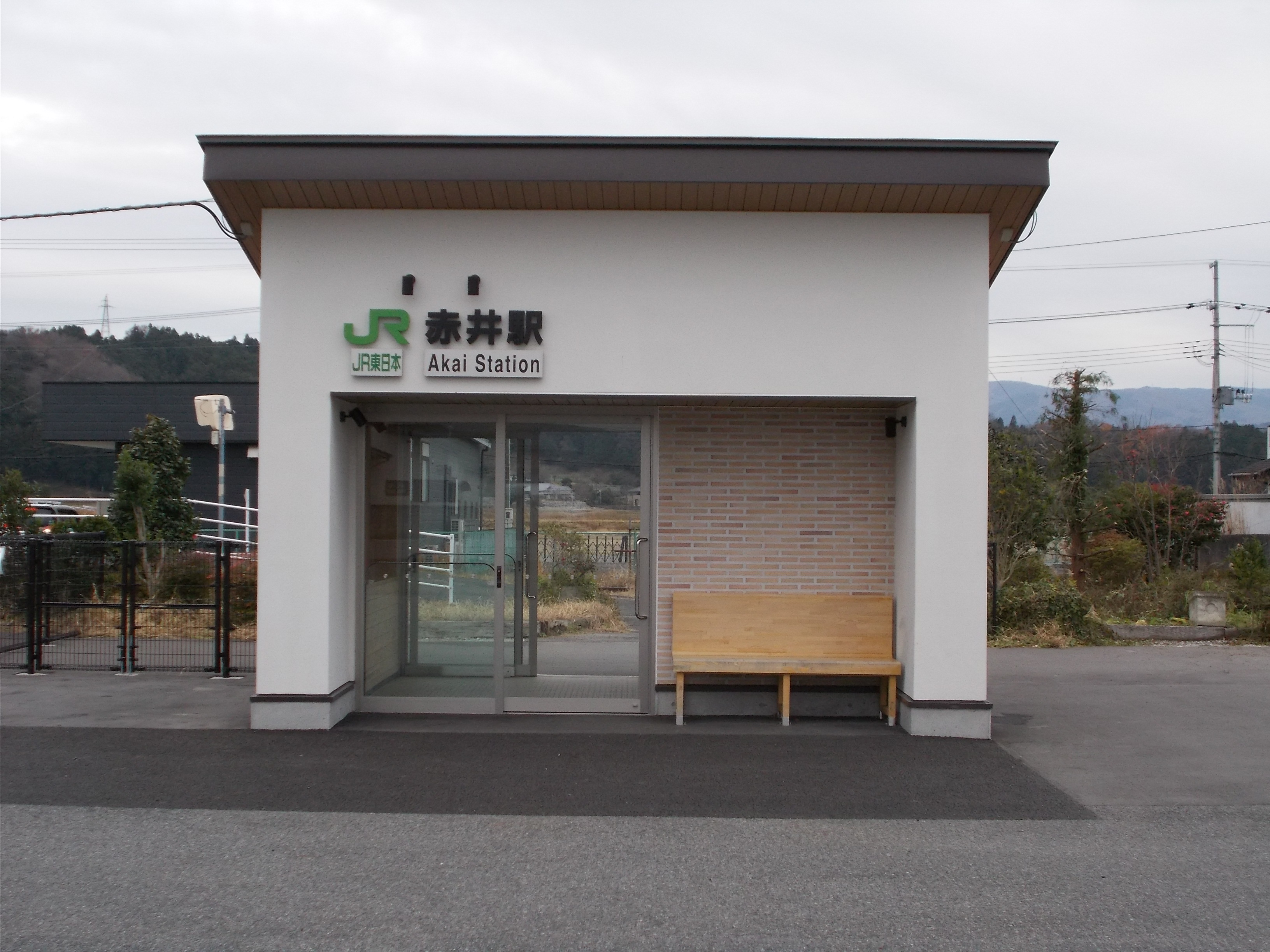 赤井駅 駅舎